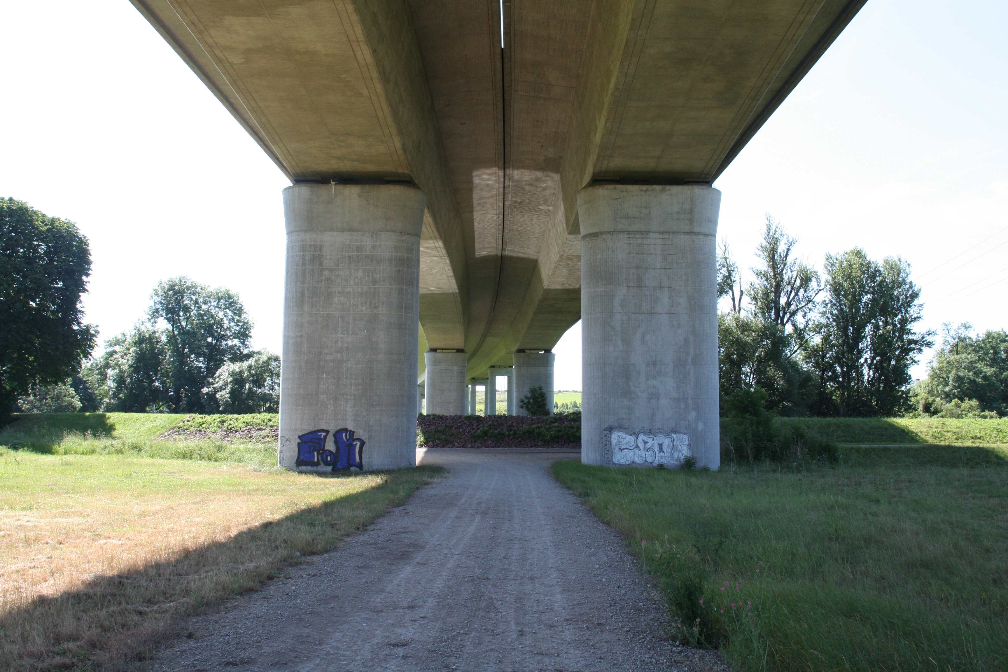 Saalebrücke der A38 bei Schkortleben in Sachsen-Anhalt